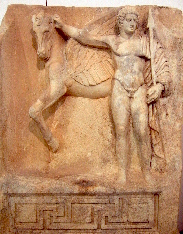 Aphrodisias (Museum): Bellerophontes und Pegasus